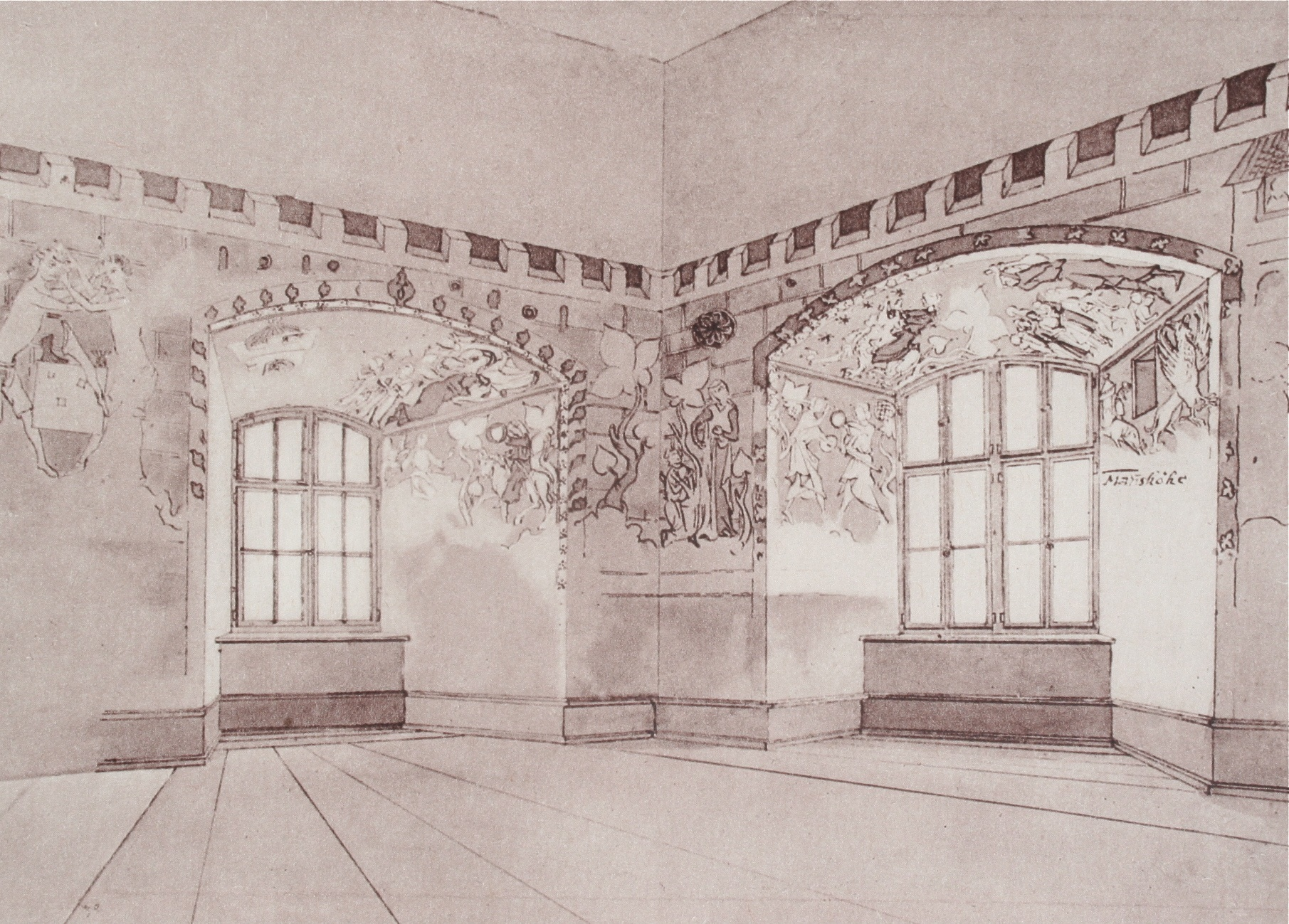 Wandmalereien des Waltensburger Meisters im Schloss Brandis; Zeichnung von J. R. Rahn